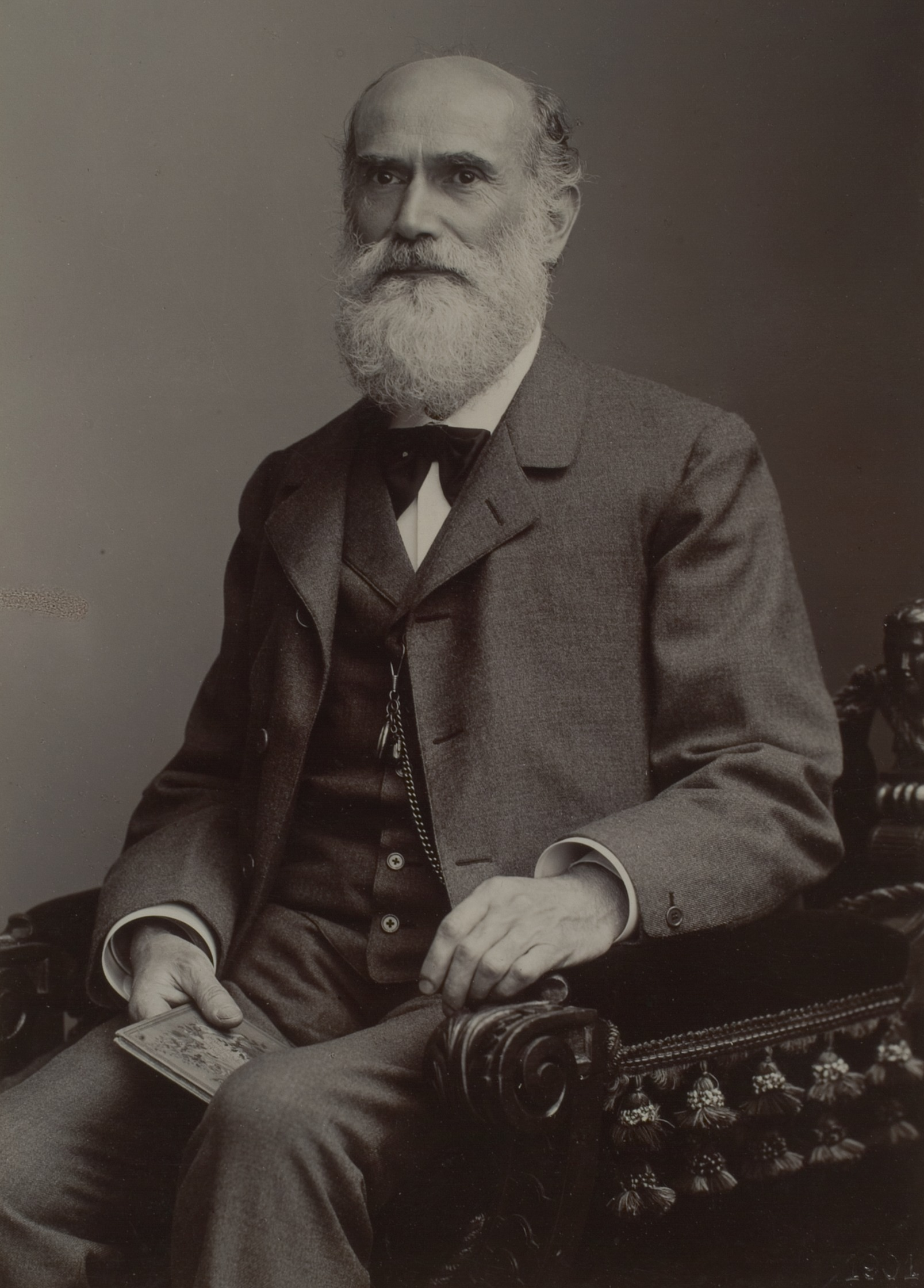 Theodor Karl Gustav Leber, Augenarzt, 1890–1910 Professor in Heidelberg